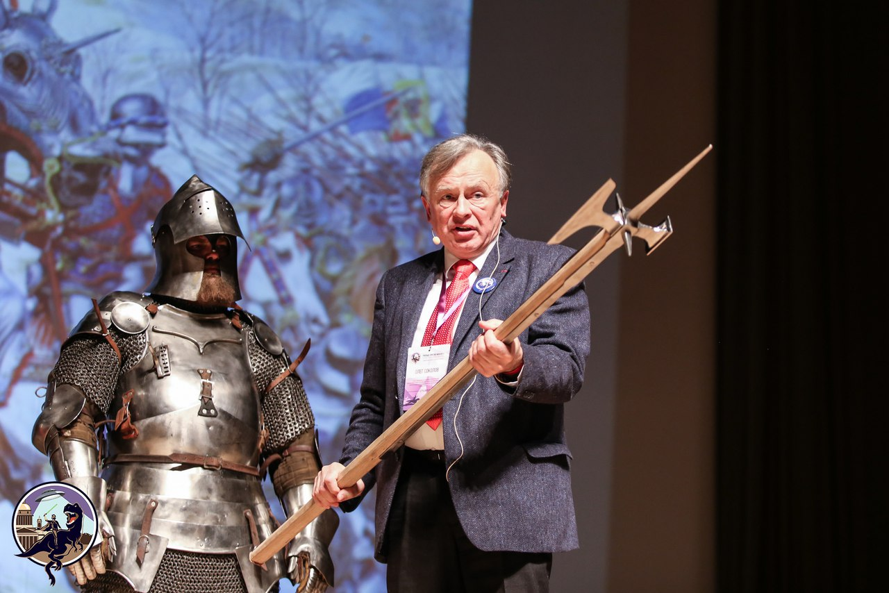 Oleg Sokolov / Оле́г Вале́рьевич Соколо́в - Ученые против мифов, Санкт-Петербург